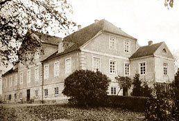 Diese Arbeit ist nicht urheberrechtlich geschützt, da ihr Autor (Urheberrechtsinhaber) unbekannt oder unbekannt ist, der Tod des Autors und kann davon ausgehen, dass mehr als 70 Jahre seit dem Tod des Autors vergangen sind.